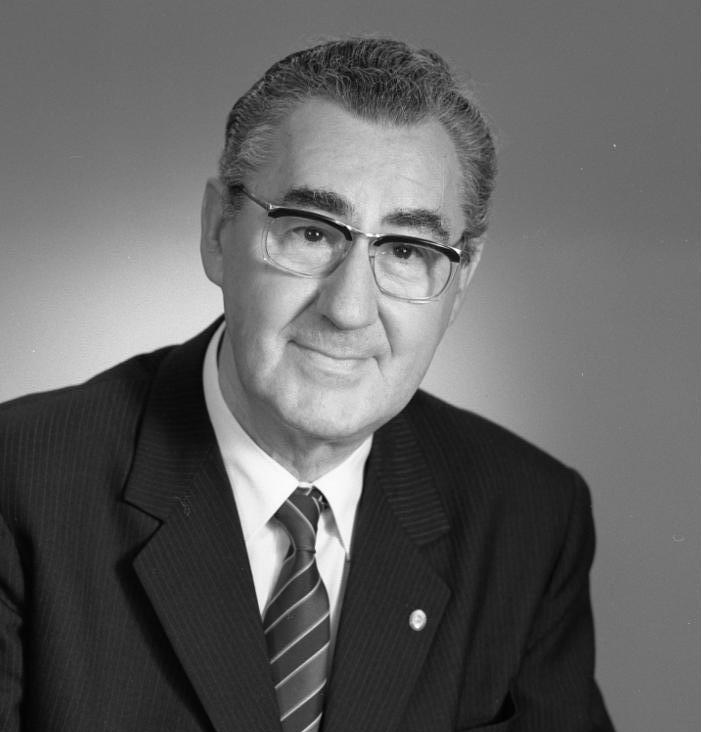 Otto Arndt ADN-ZB/Brüggmann/13.6.86/Berlin: Otto Arndt, Minister für Verkehrswesen und Generaldirektor der Deutschen Reichsbahn. Mitglied des ZK der SED, geb. am 19.7.1920, Bauschlosser, Ingenieur für Eisenbahn- Betriebs- und Verkehrstechnik. [Minister für Verkehrswesen Otto Arndt (Porträt)] Abgebildete Personen: Arndt, Otto: Minister für Verkehrswesen, DDR